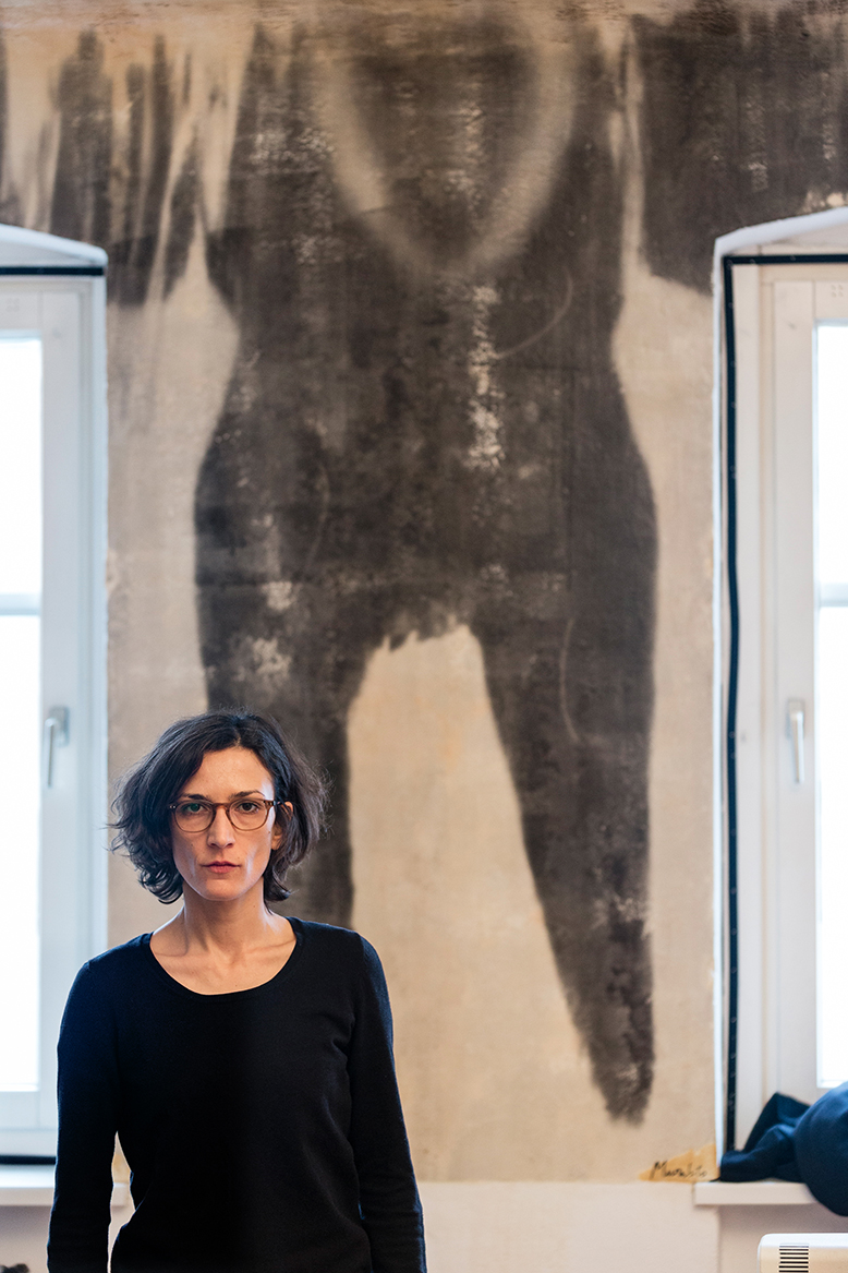 Die Künstlerin Valentina Murabito vor ihrer auf der Atelierwand entwickelten Analogfotografie "Geier" (2016)